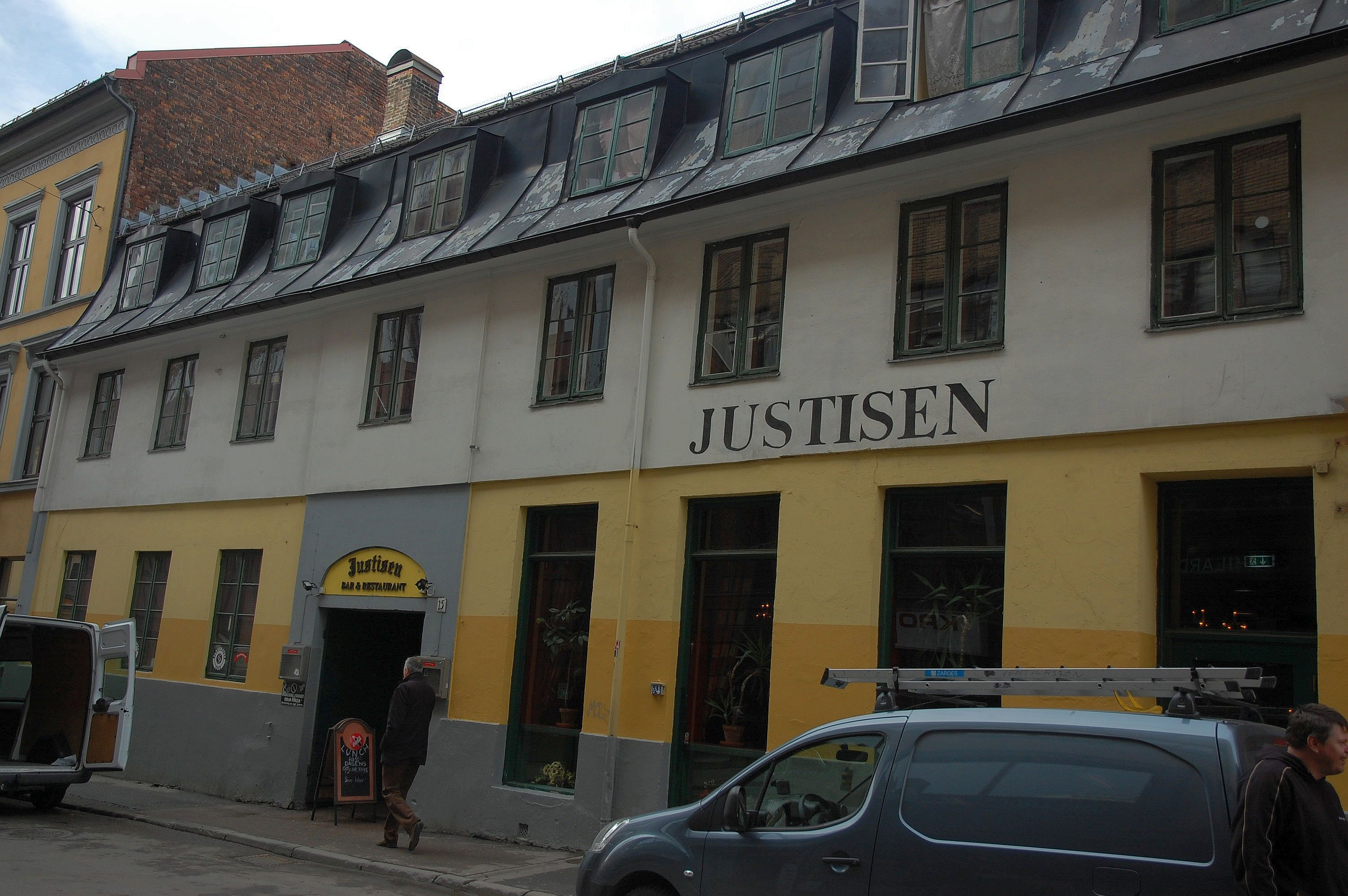 Justisen i Møllergata i Oslo